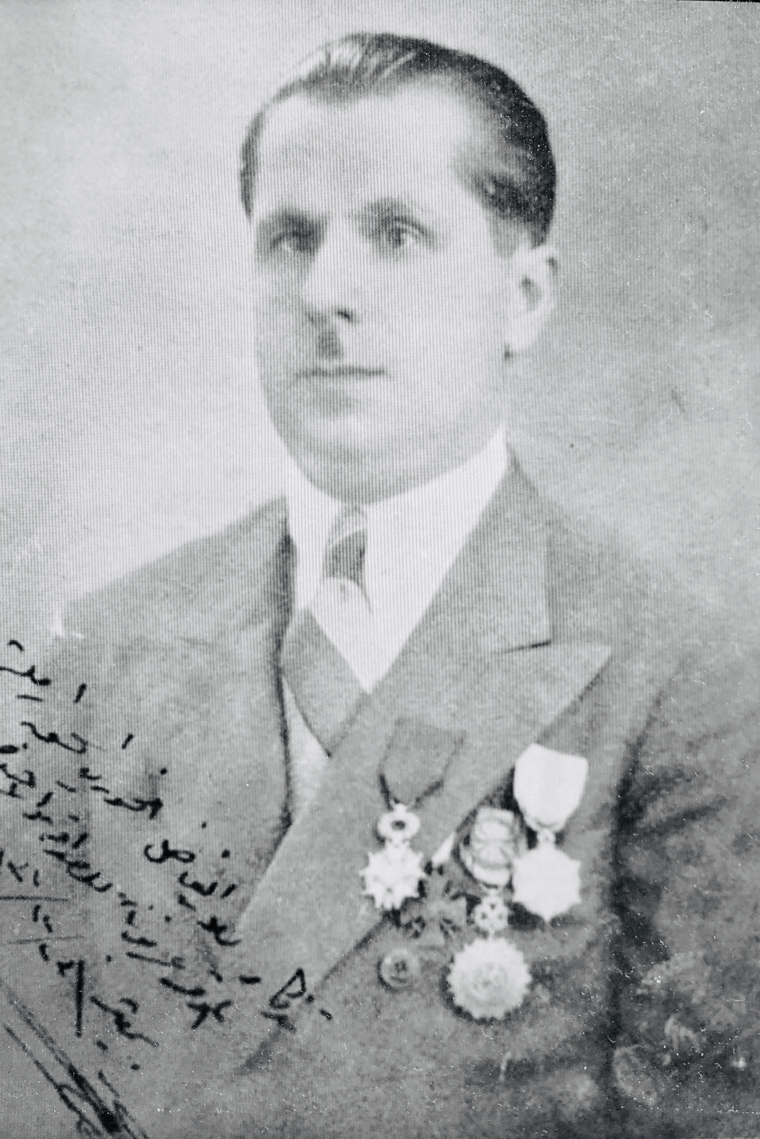 Michel Dôme